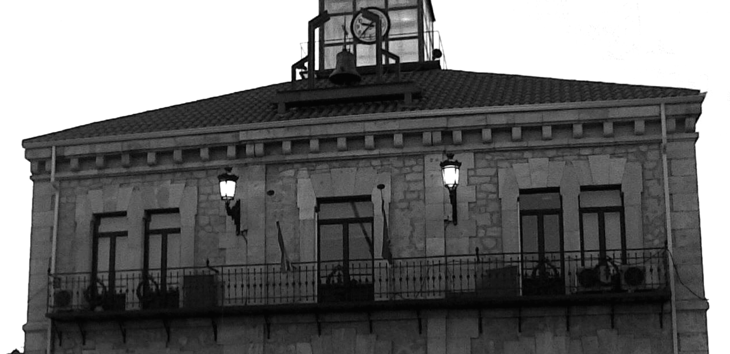 Festival musical frente al Ayuntamiento de Guadalix de la Sierra